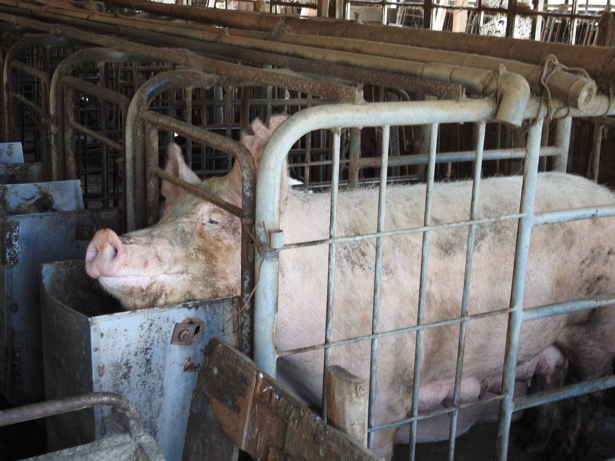 顔側に餌桶